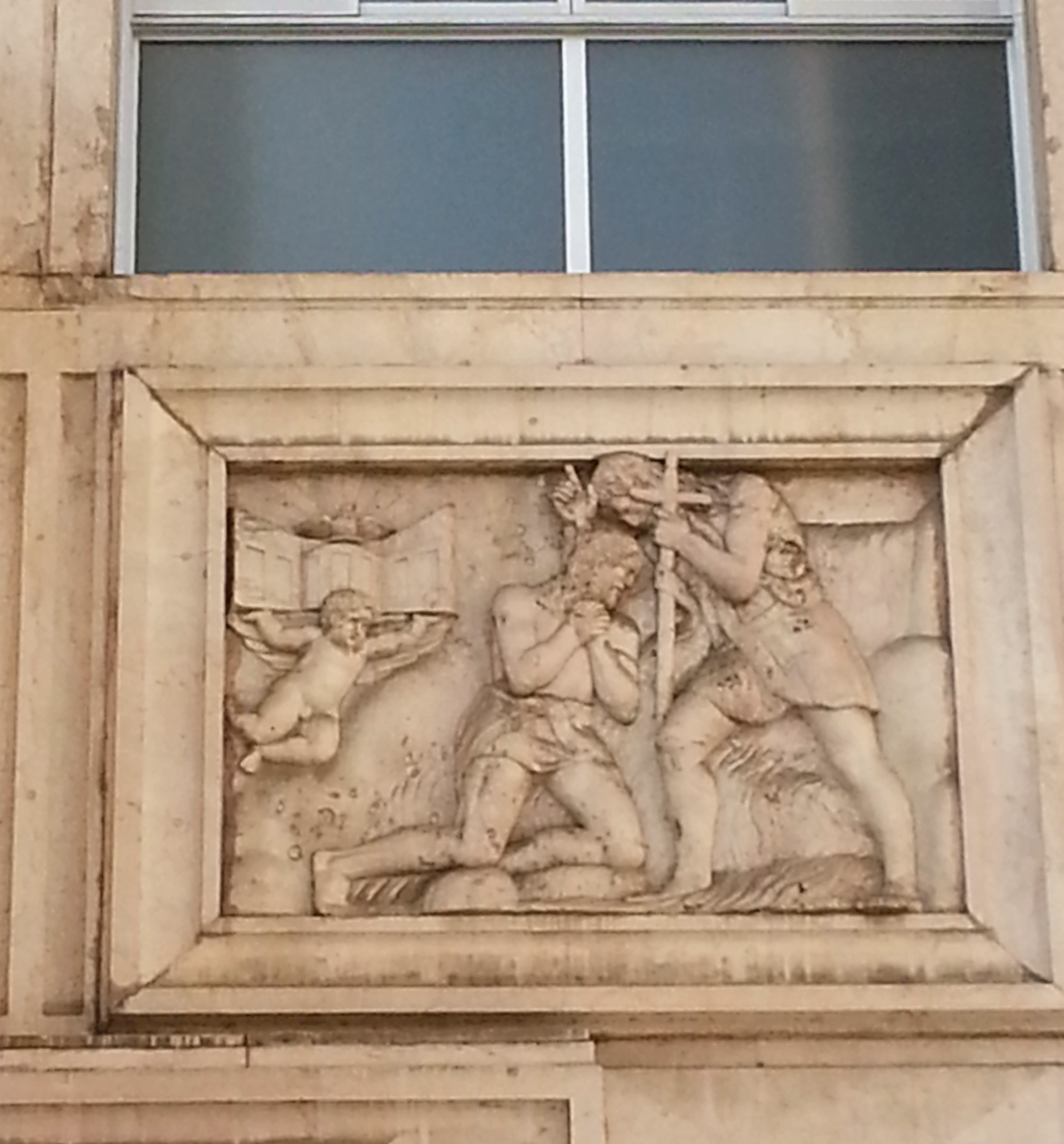 Particolare-Palazzo della Libertà